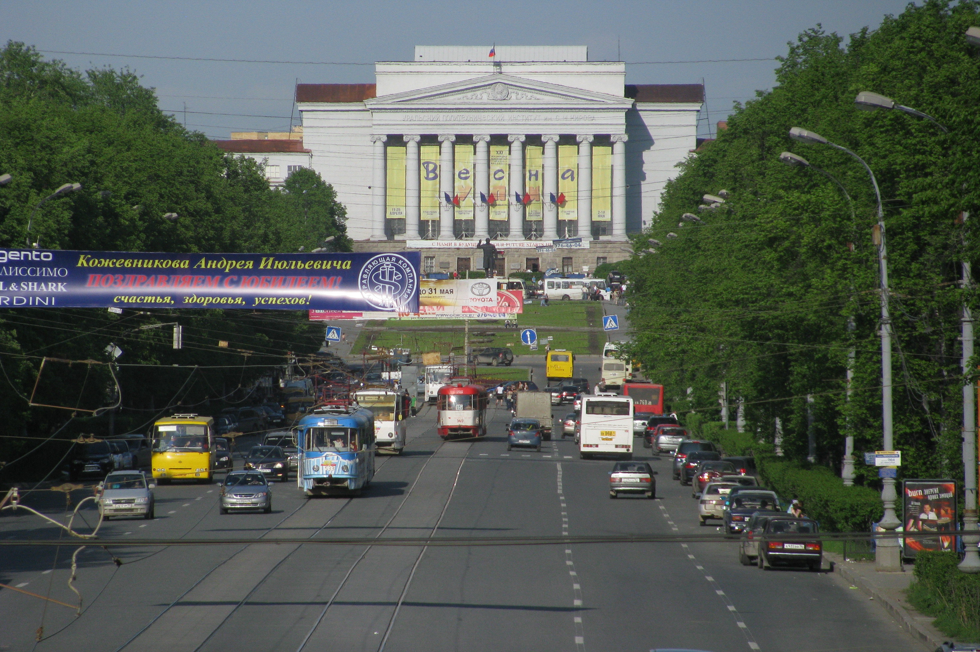 Leninova třída; v pozadí Jelcinova uralská státní technická univerzita; Jekatěrinburg, Rusko